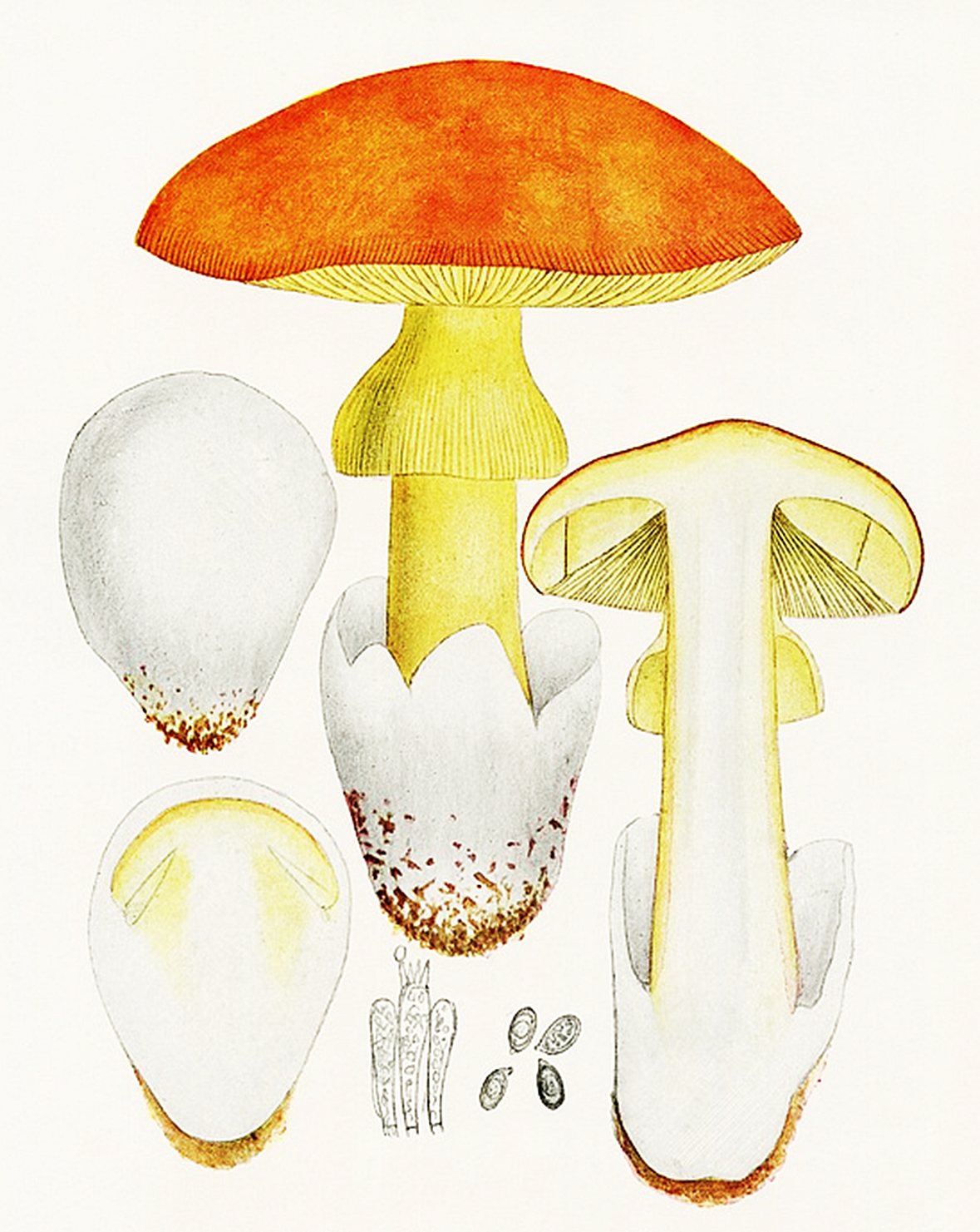 Giacomo Bresadola: Amanita caesarea, 1927